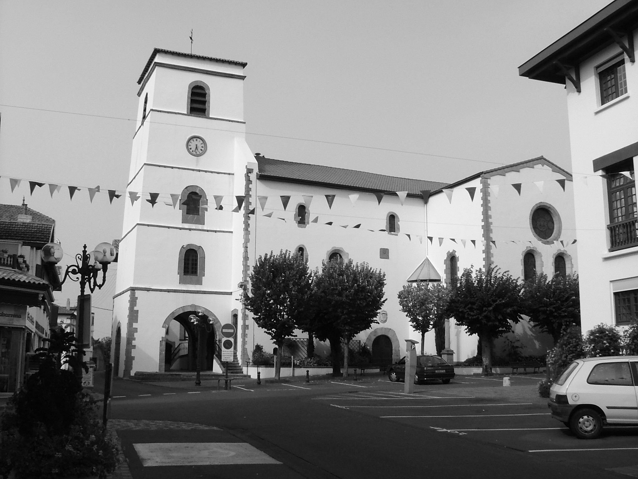 HENDAYE église Saint Vincent